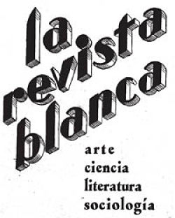 La Revista Blanca est une revue individualiste libertaire publiée à Madrid de 1898 à 1905 et à Barcelone du 1er juin 1923 au 15 août 1936.